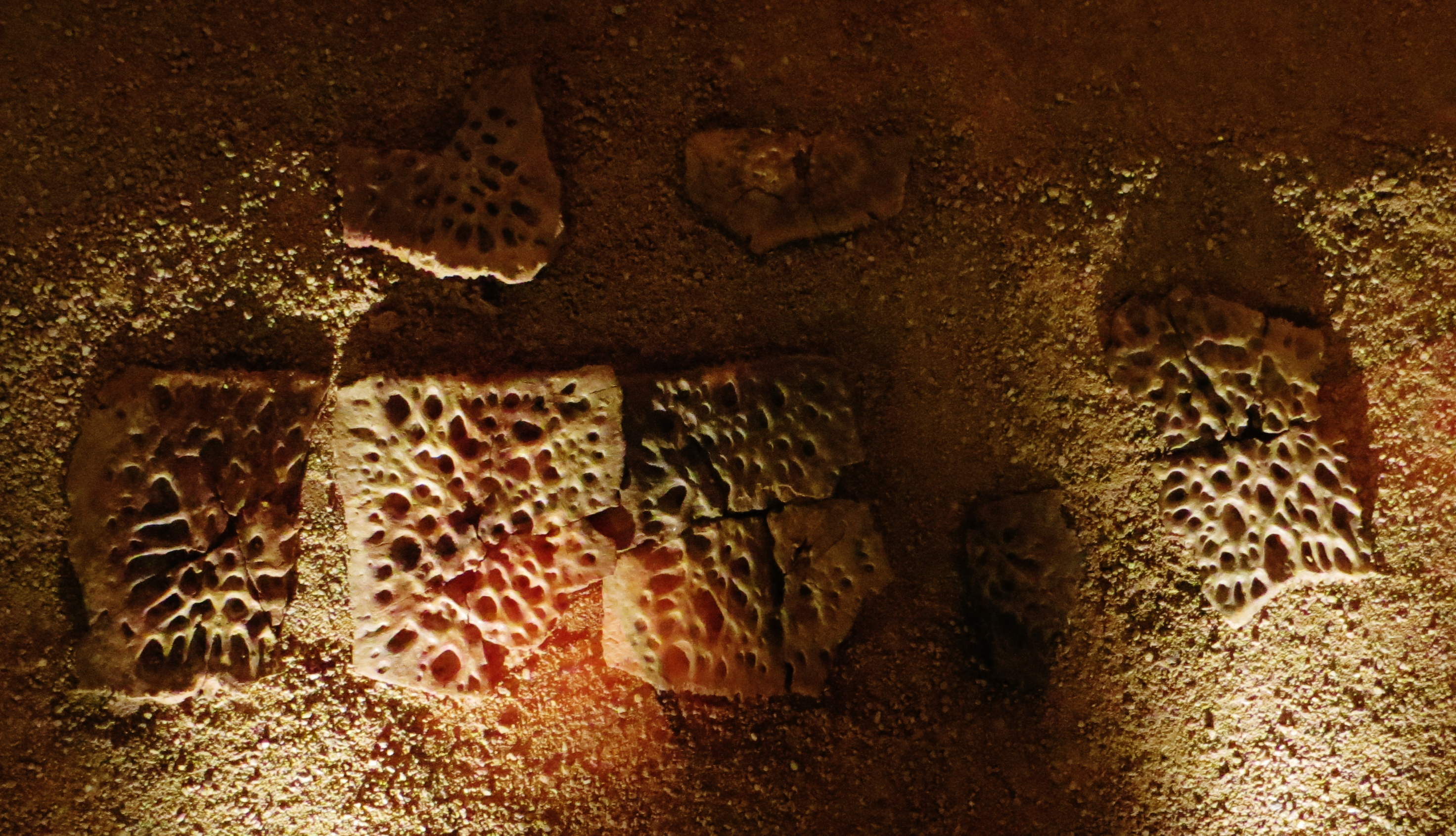 Fossil of Sarcosuchus, an extinct reptile- Took the photo at Museo di Storia Naturale di Venezia